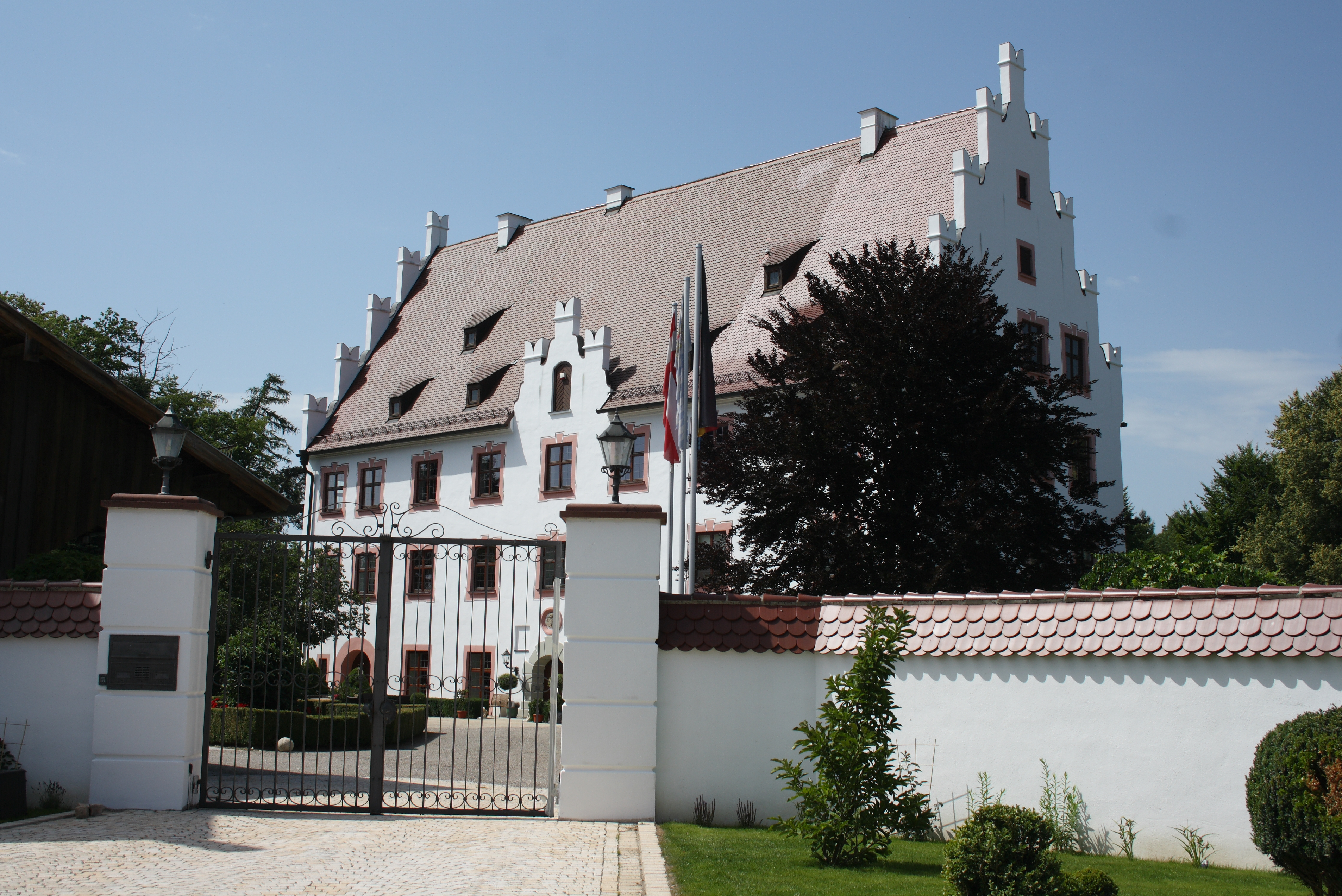 Schloss der Freiherren von Stain in Eberstall, einem Ortsteil von Jettingen-Scheppach im Landkreis Günzburg(Bayern), erbaut um 1602